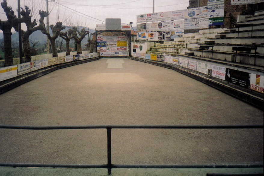 Foto de la Bolera de Sobarzo, (Penagos, Cantabria, España).